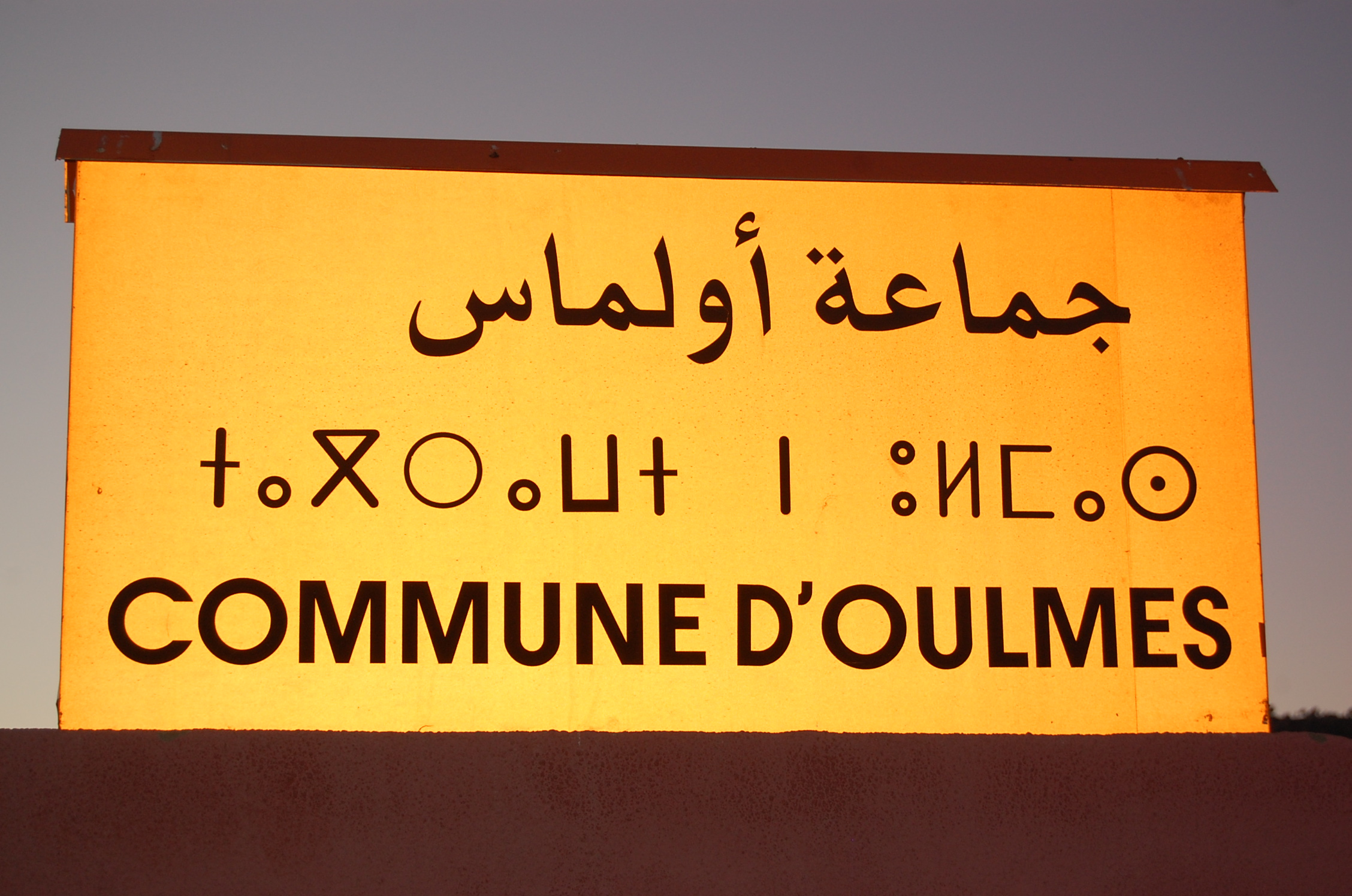 Walon: Plake d' intrêye al comene d' Oulmesse : e tifinar : ⵜⴰⴳⵔⴰⵡⵜ ⵏ ⵓⵍⵎⴰⵙ